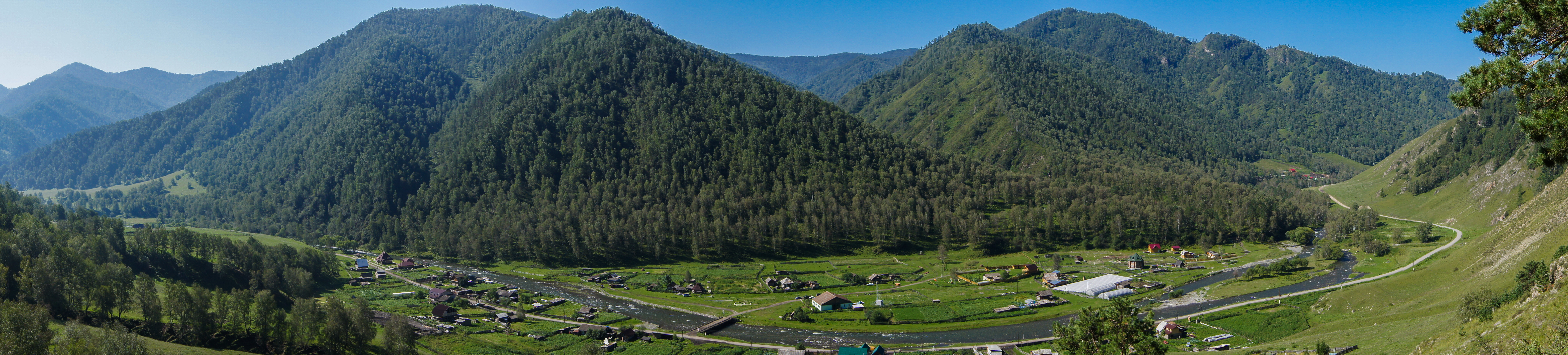 Панорамный снимок села Уожан